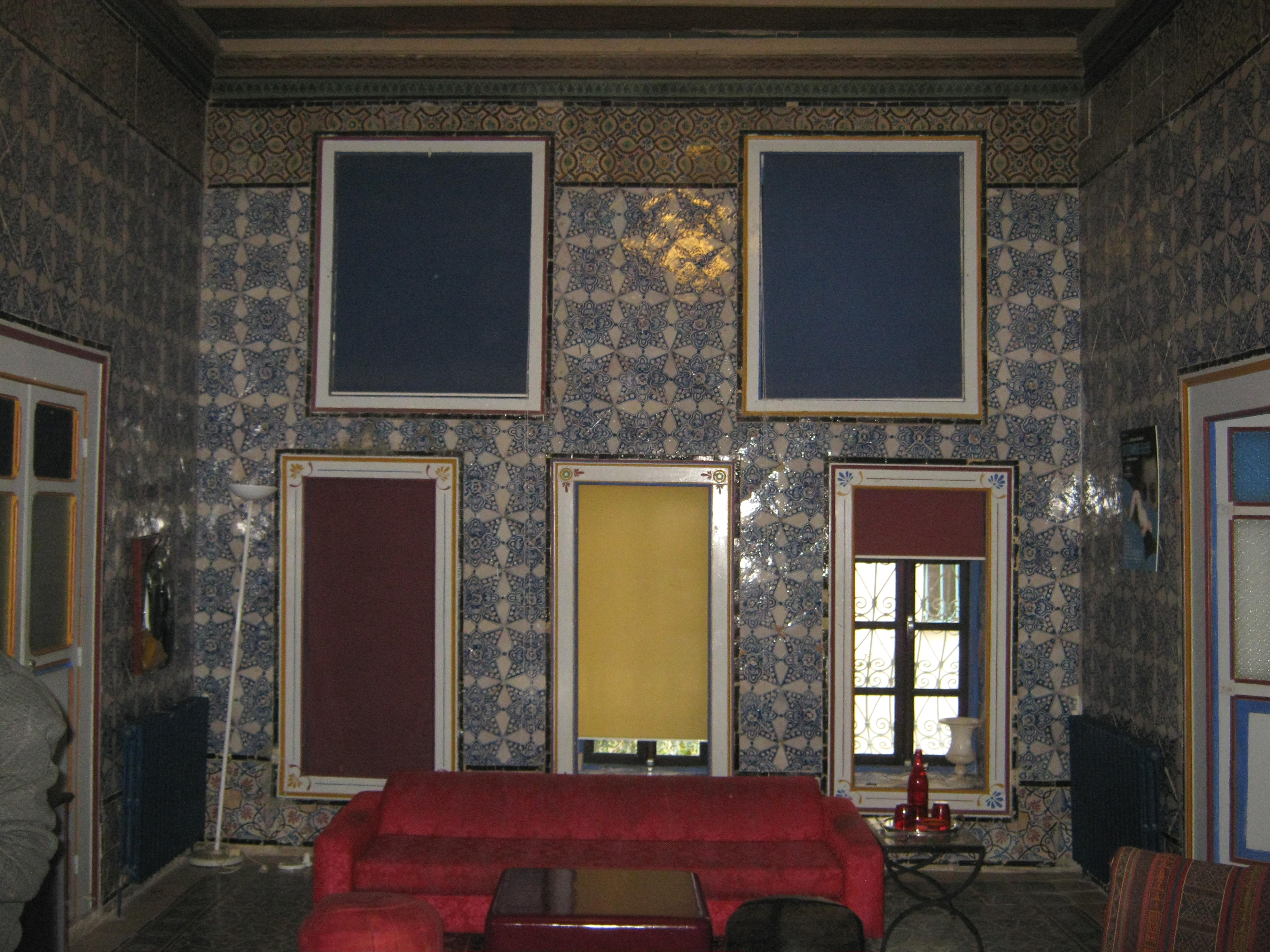 Dar BelCadi (la chambre bleue)